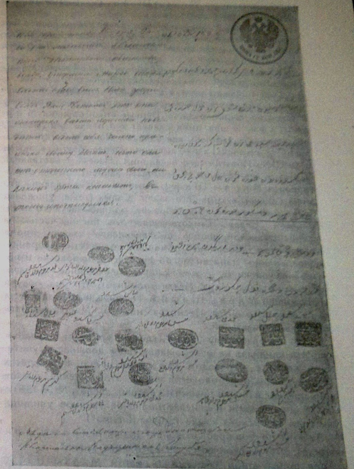 Справка выданная жене Мирза Шафи